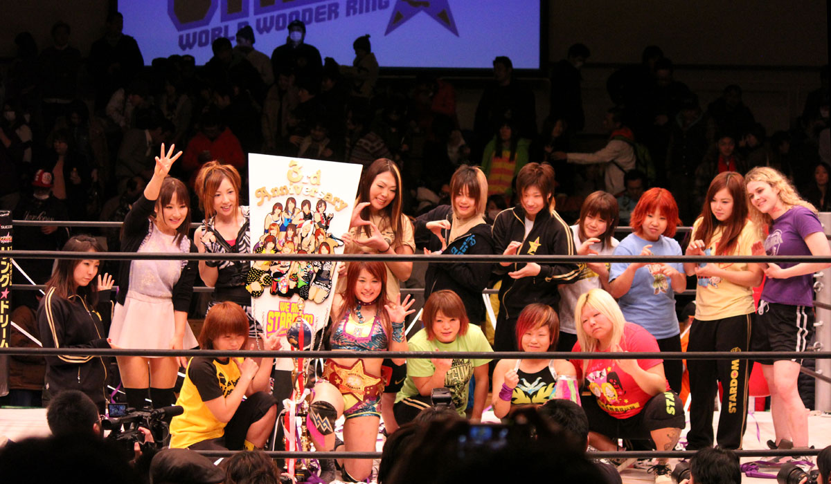 スターダム 3周年記念大会 2014.1.26 後楽園ホール